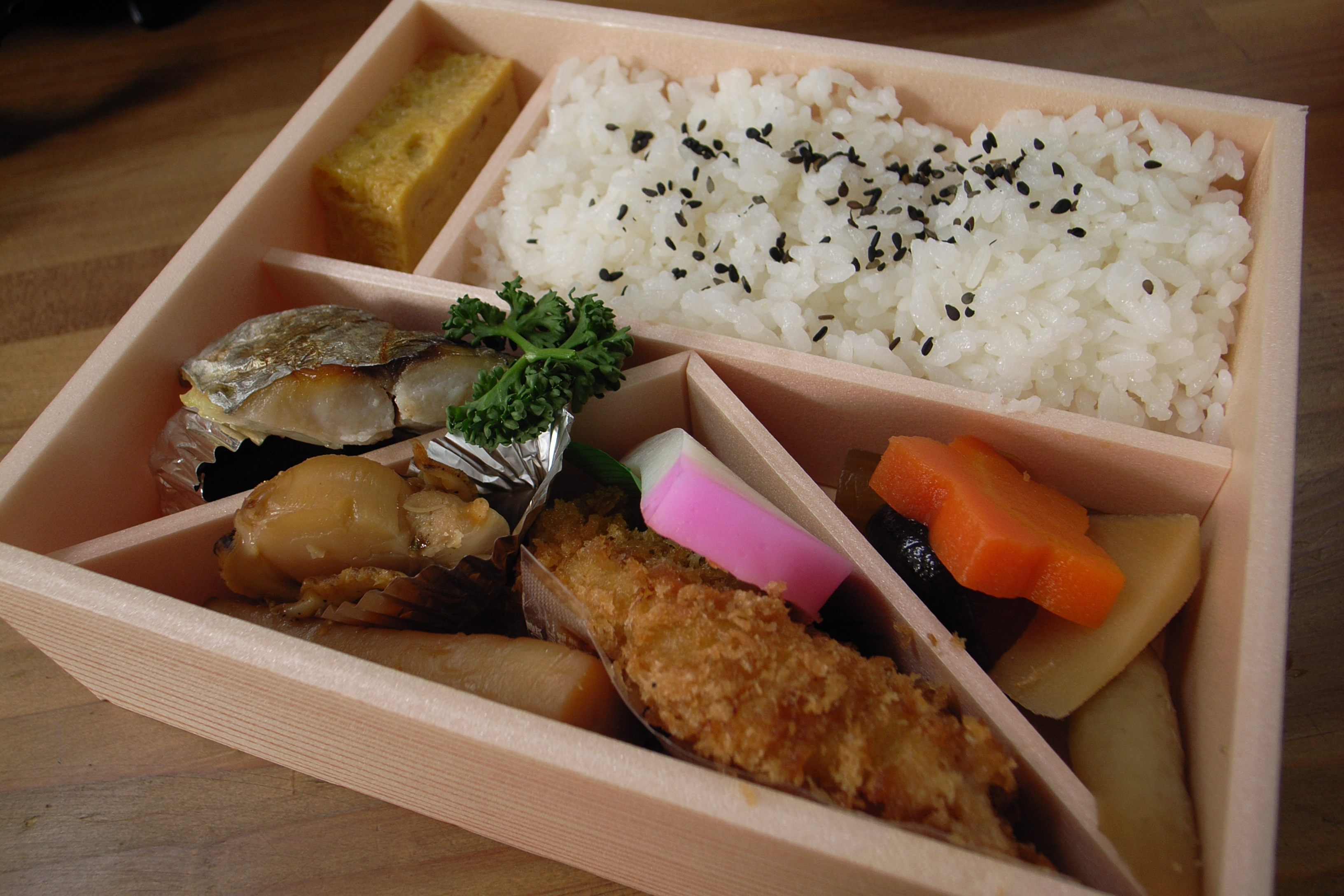 makunouchi bentou (lunchbox)